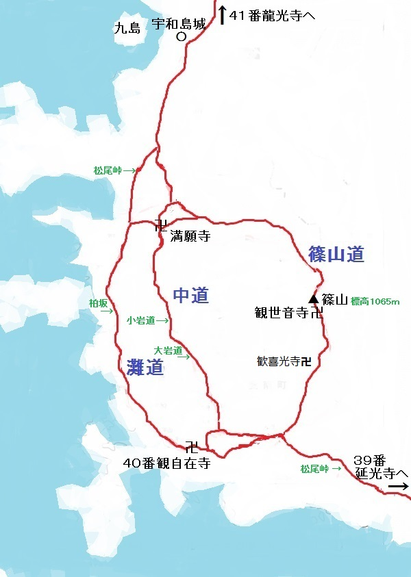 満願寺への３ルート